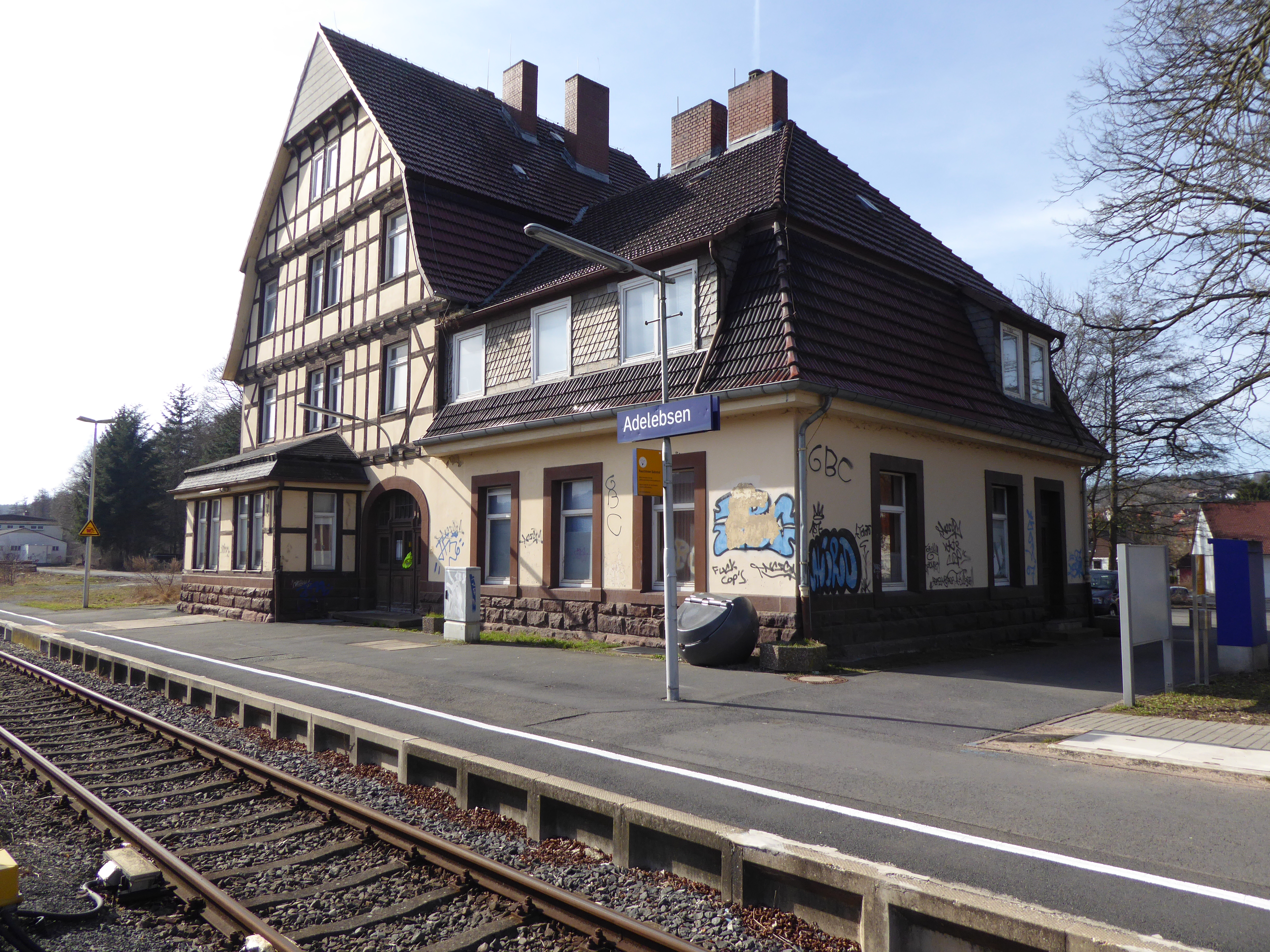 Bahnhofsgebäude Adelebsen